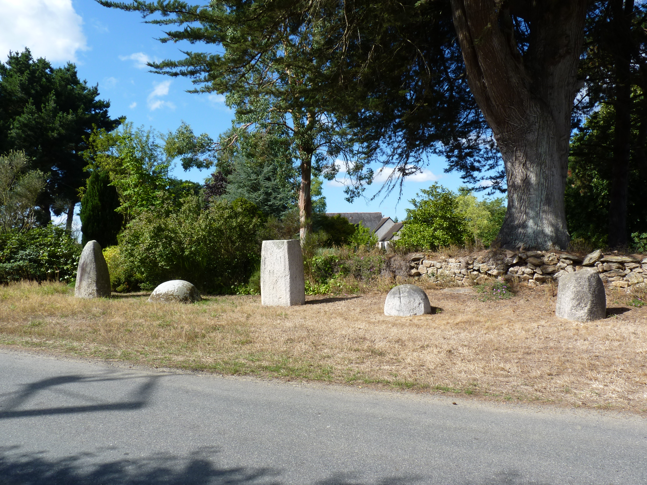 Stèles découvertes dans les champs avoisinants et exposées en bordure de route.